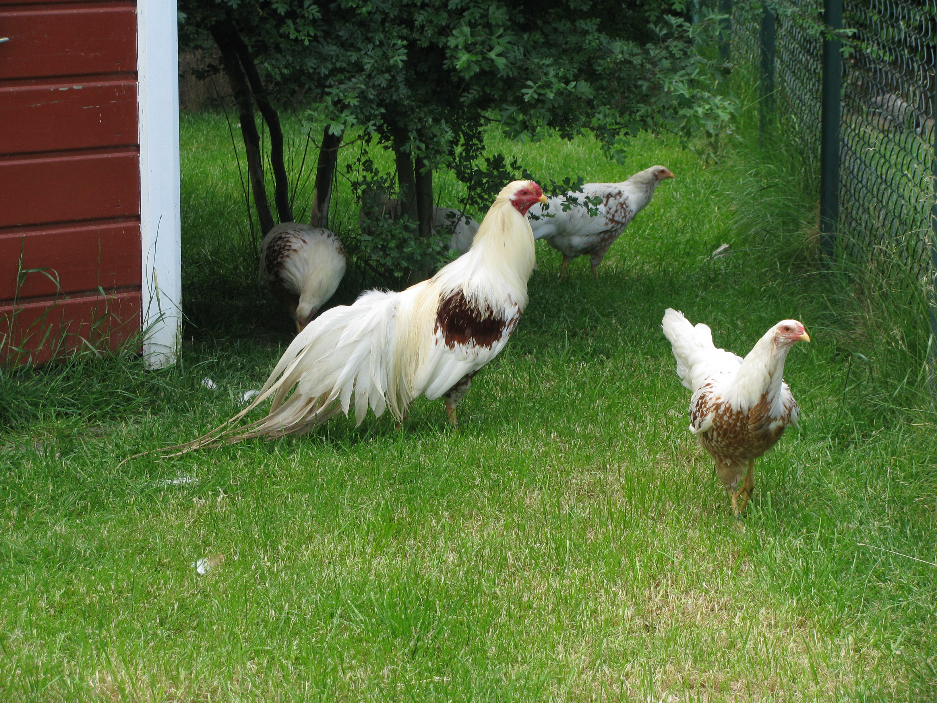 Yokohama-Hühner, aufgenommen im Wissenschaftlichen Geflügelhof Sinsteden